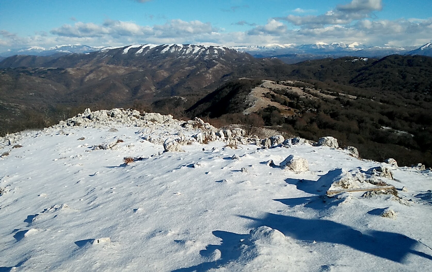 Vetta monte zappi